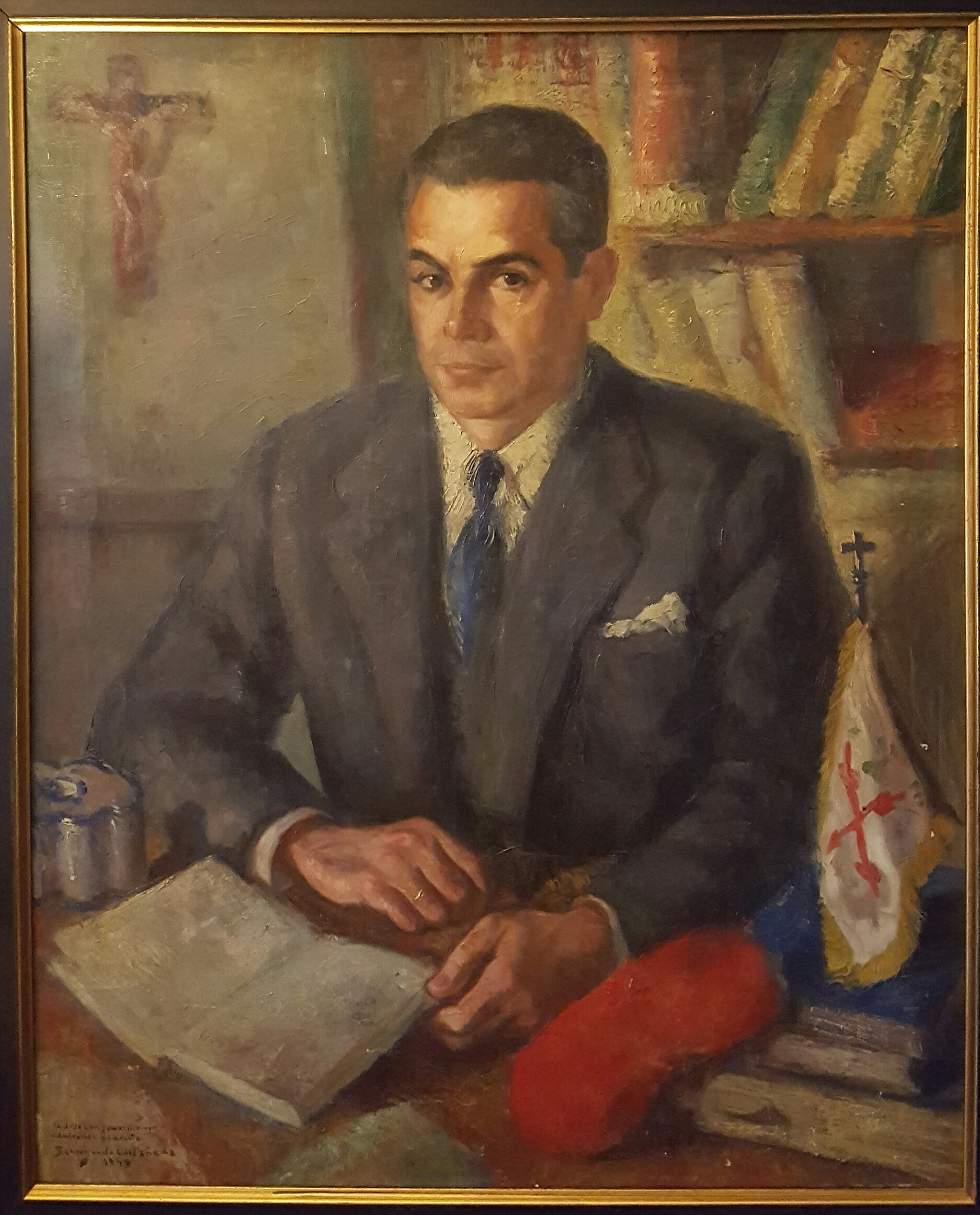 Retrato D. Jose Luis Zamanillo Gonzalez-Camino por Sansegundo Castaneda (1949).